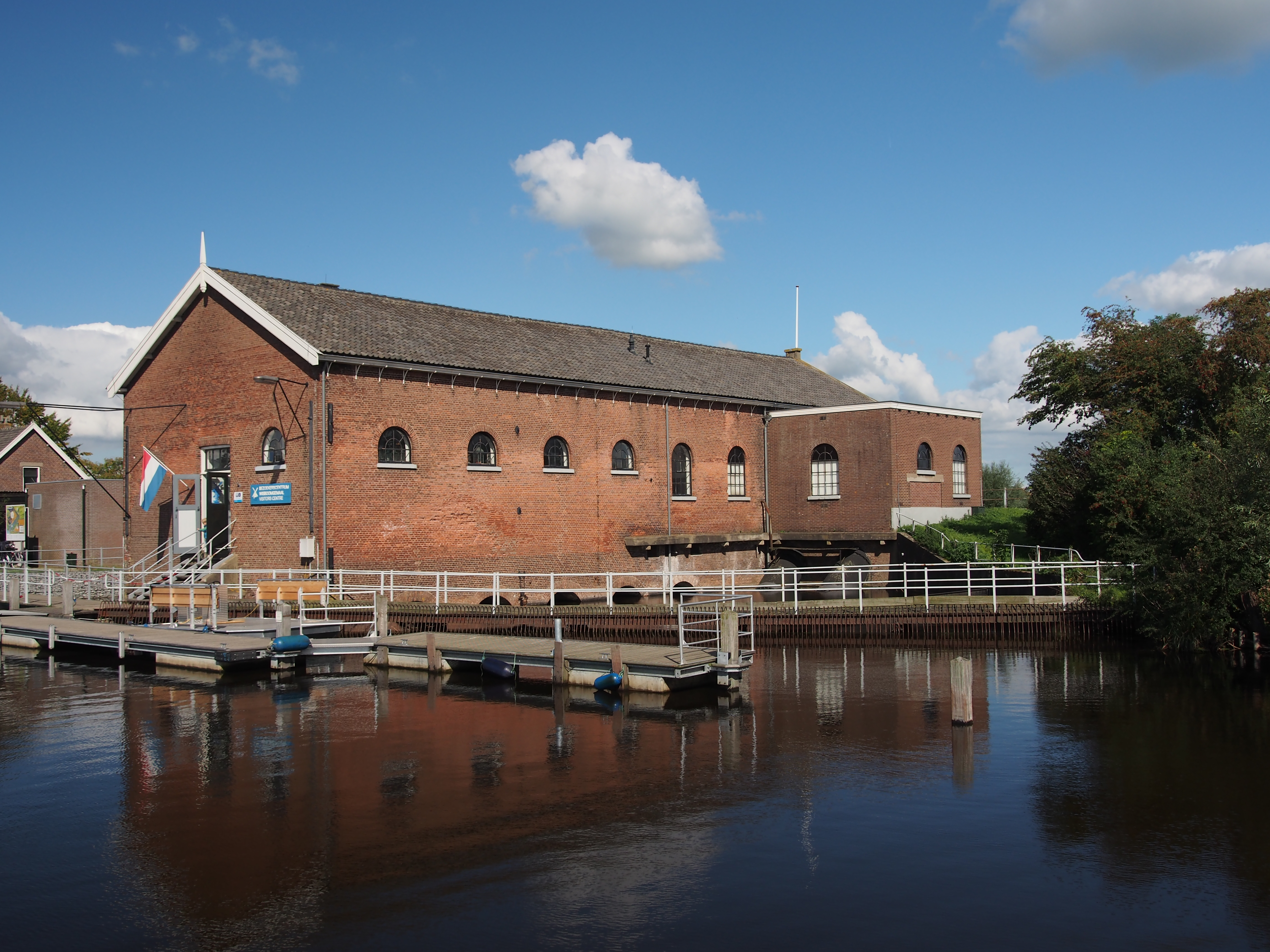 Bezoekerscentrum Wisboomgemaal.